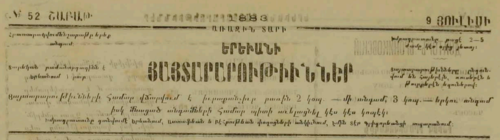 «Երևանի հայտարարություններ» թերթի գլխավոր էջը 1883 թ. հուլիսի 9-ի համարում